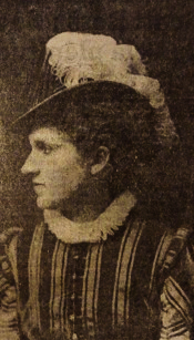 Alice Renaud, comédienne belge assassinée par Gustave Vandersmissen, son ex-mari, en 1886